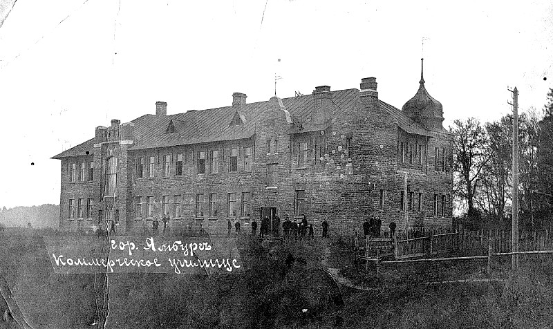 Коммерческое училище в Кингисеппе, дореволюционная фотография